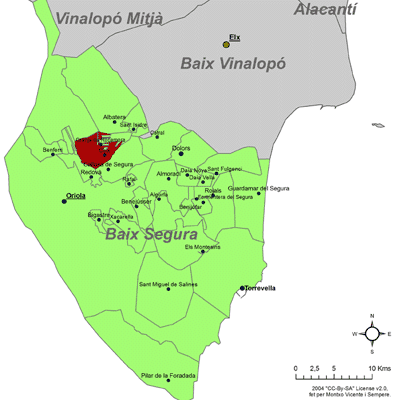 Localització de Coix respecte el Baix Segura